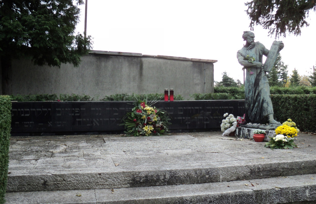 Spomen-grobnica na Mirogoju Židovima stradalim u logorima